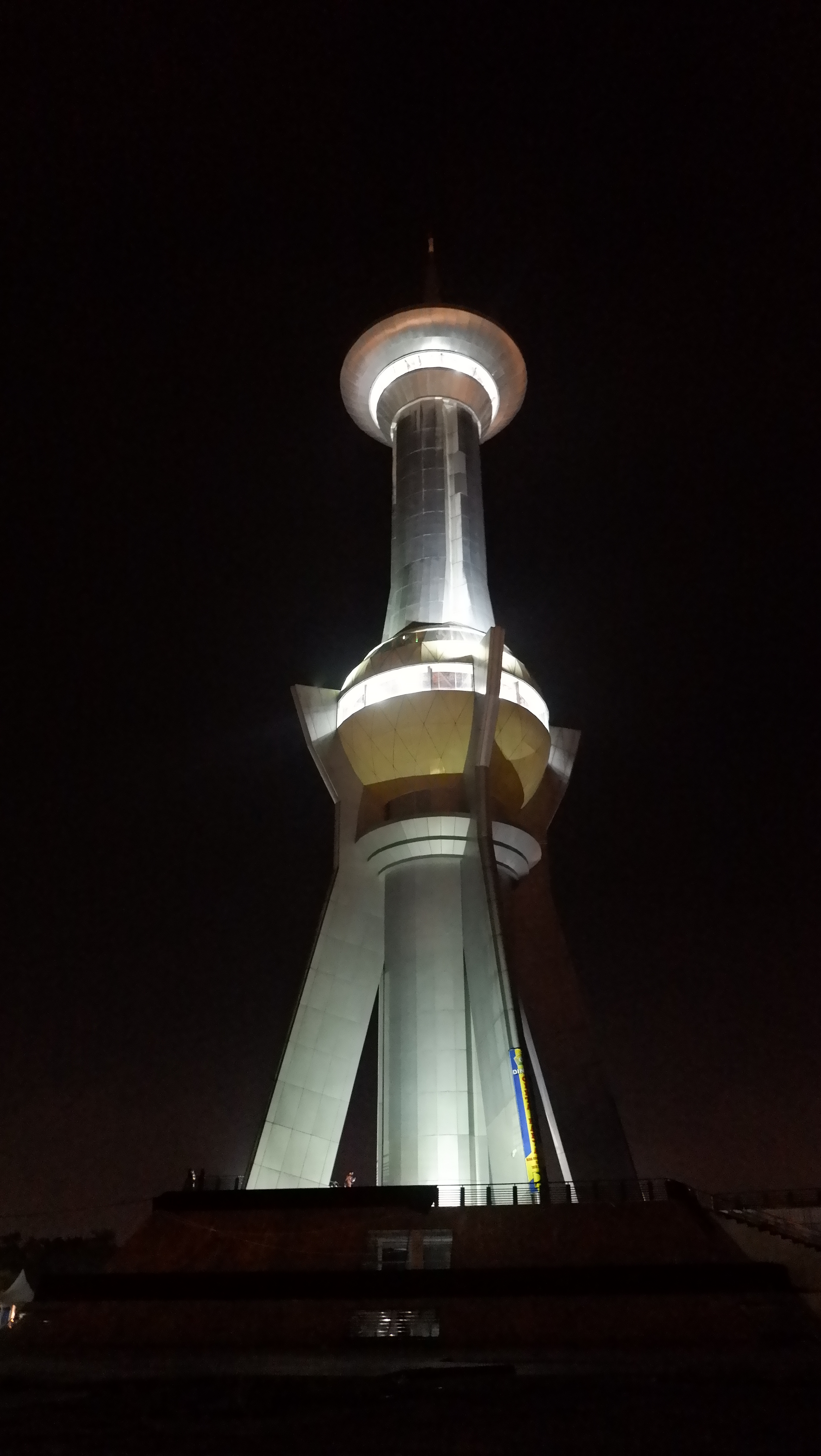 Tugu Persatuan MTQ saat malam